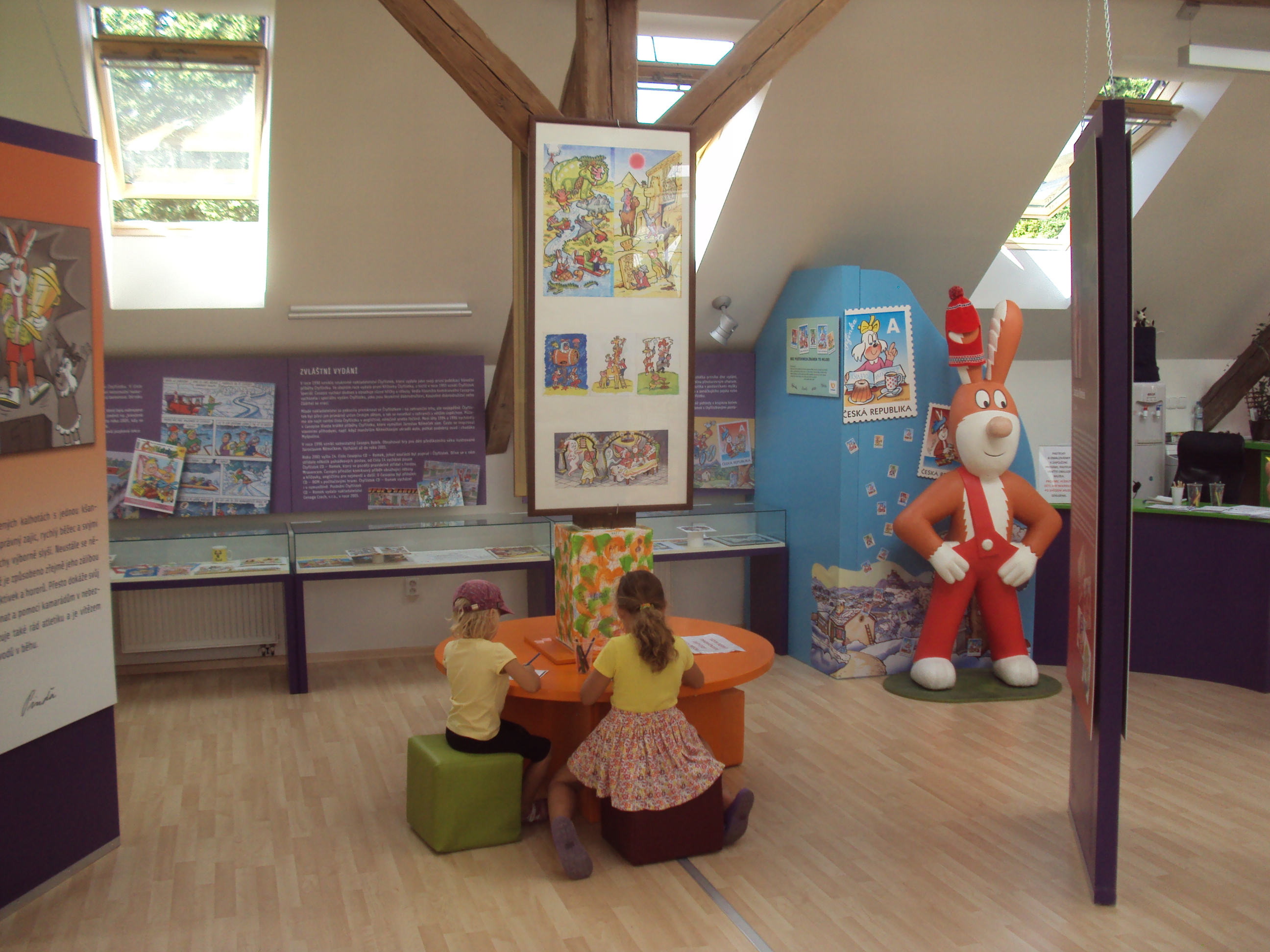 Uvnitř muzea